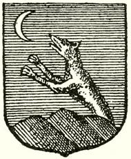 MÁRKI SÁNDOR DÓSA GYÖRGY 1470-1514 A MAGYAR TUDOMÁNYOS AKADÉMIA SEGÉLYEZÉSÉVEL KIADJA A MAGYAR TÖRTÉNELMI TÁRSULAT SZERKESZTI DR. DÉZSI LAJOS BUDAPEST AZ ATHENAEUM R.-T. KÖNYVNYOMDÁJA 1913